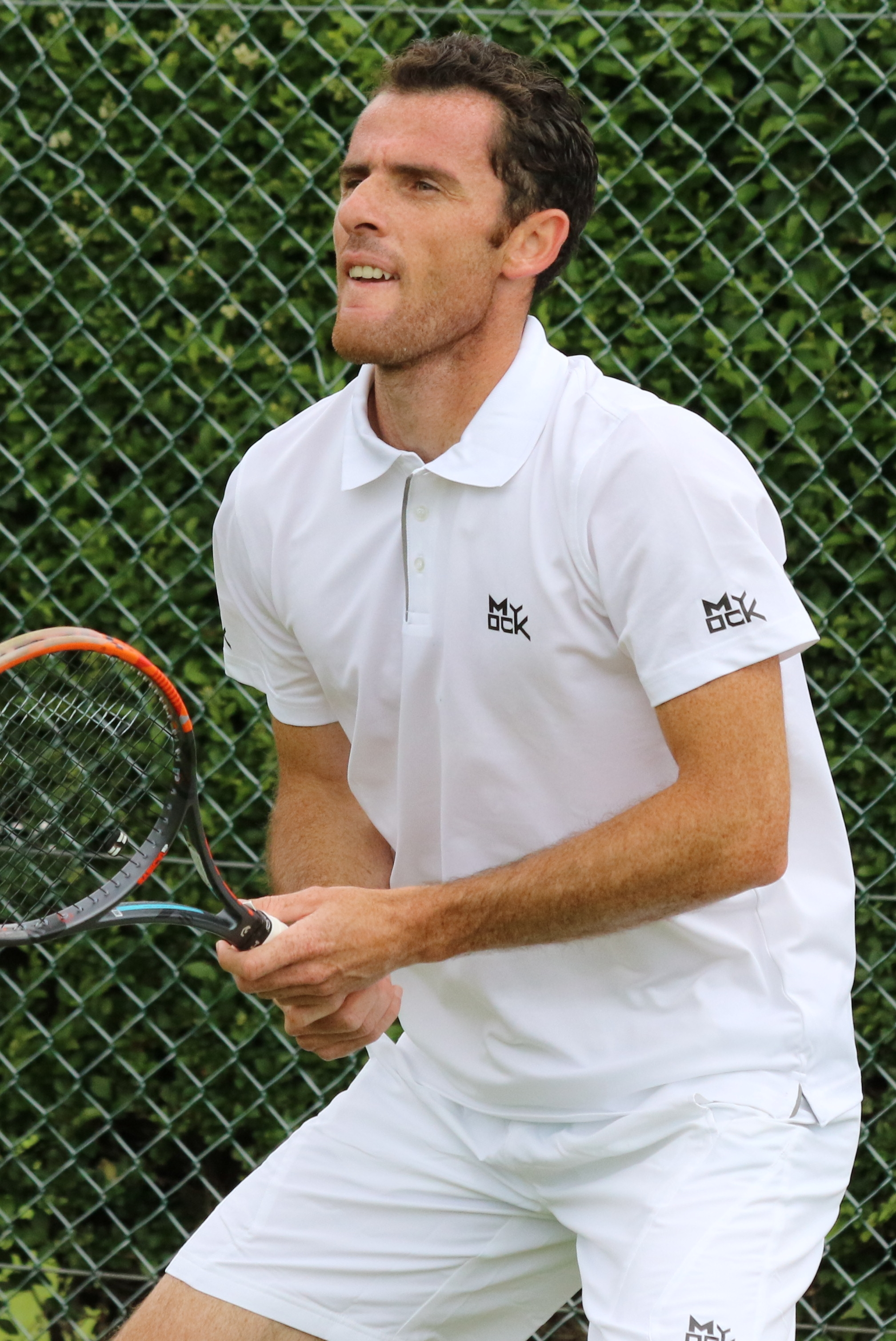 Guez WMQ16 (3)